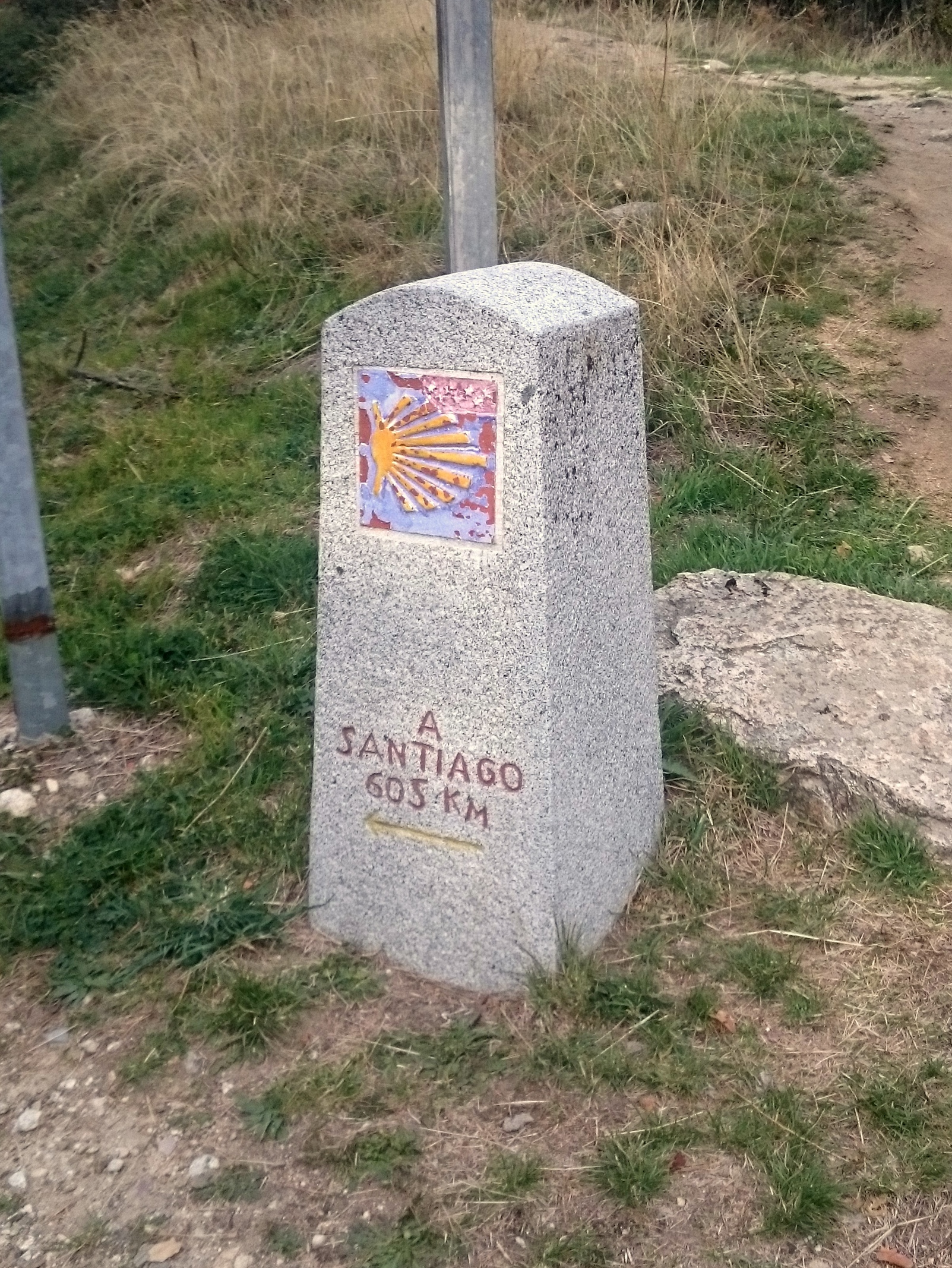 Indicación del Camino de Santiago (Camino de Madrid) junto al tramo de la calzada romana de la Fuenfría situado a la altura del centro de visitantes del valle This is a photography of a Special Area of Conservation in Spain with the ID: ES3110005. Natura2000 entry, EEA entry